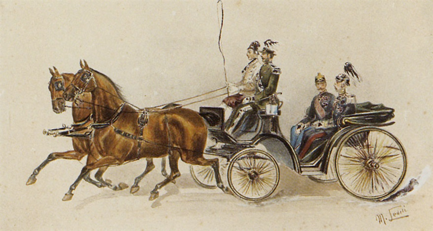 Kaiser Franz Joseph I. von Österreich und Kaiser Wilhelm II. von Deutschland 1900